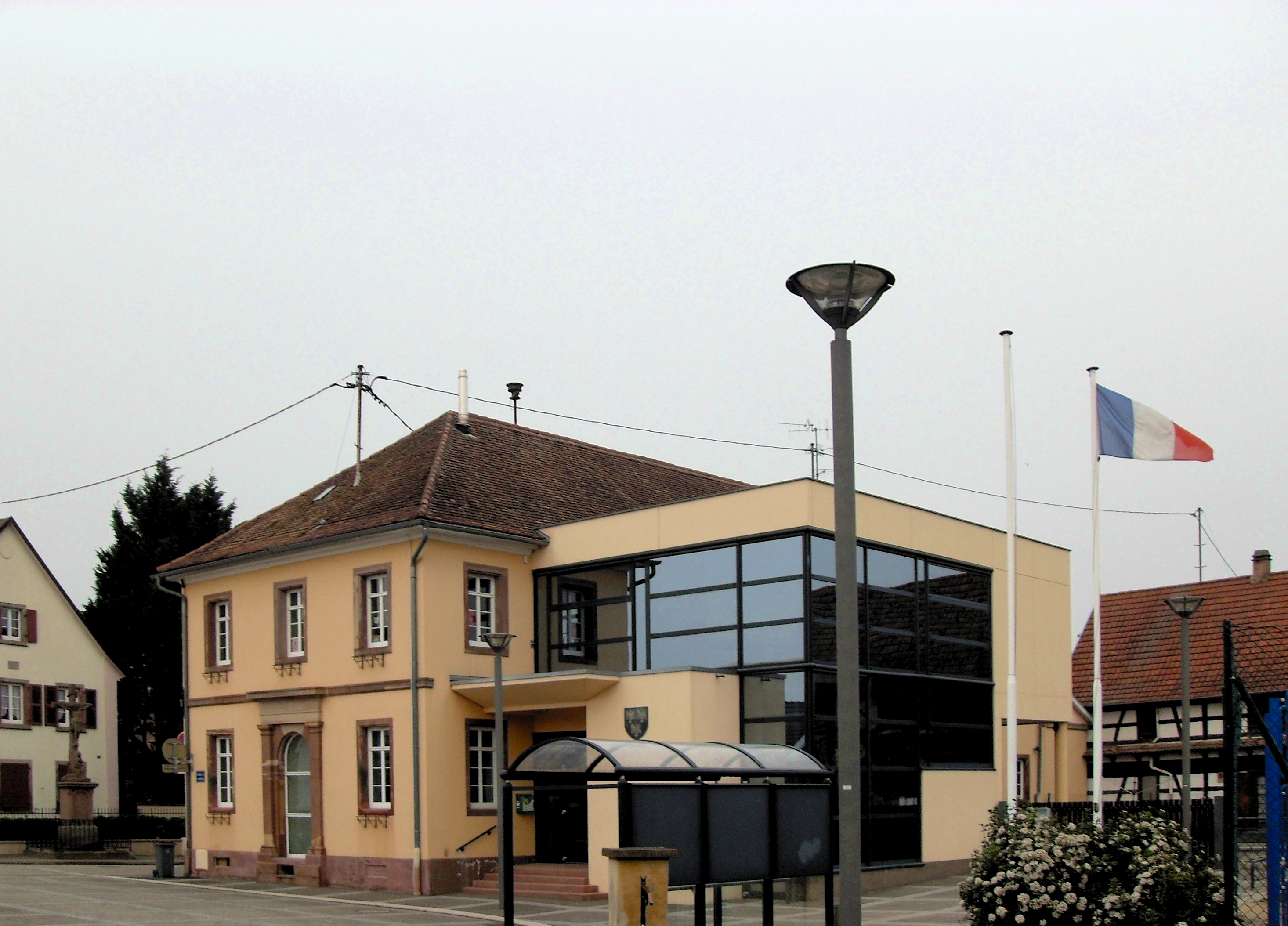 La mairie d'Ichtratzheim